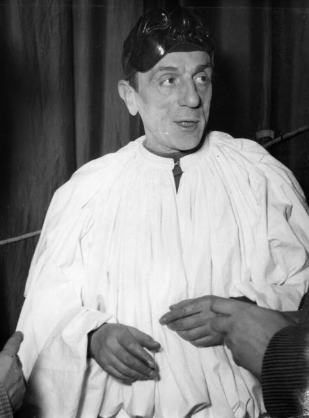 Eduardo De Filippo truccato da Pulcinella